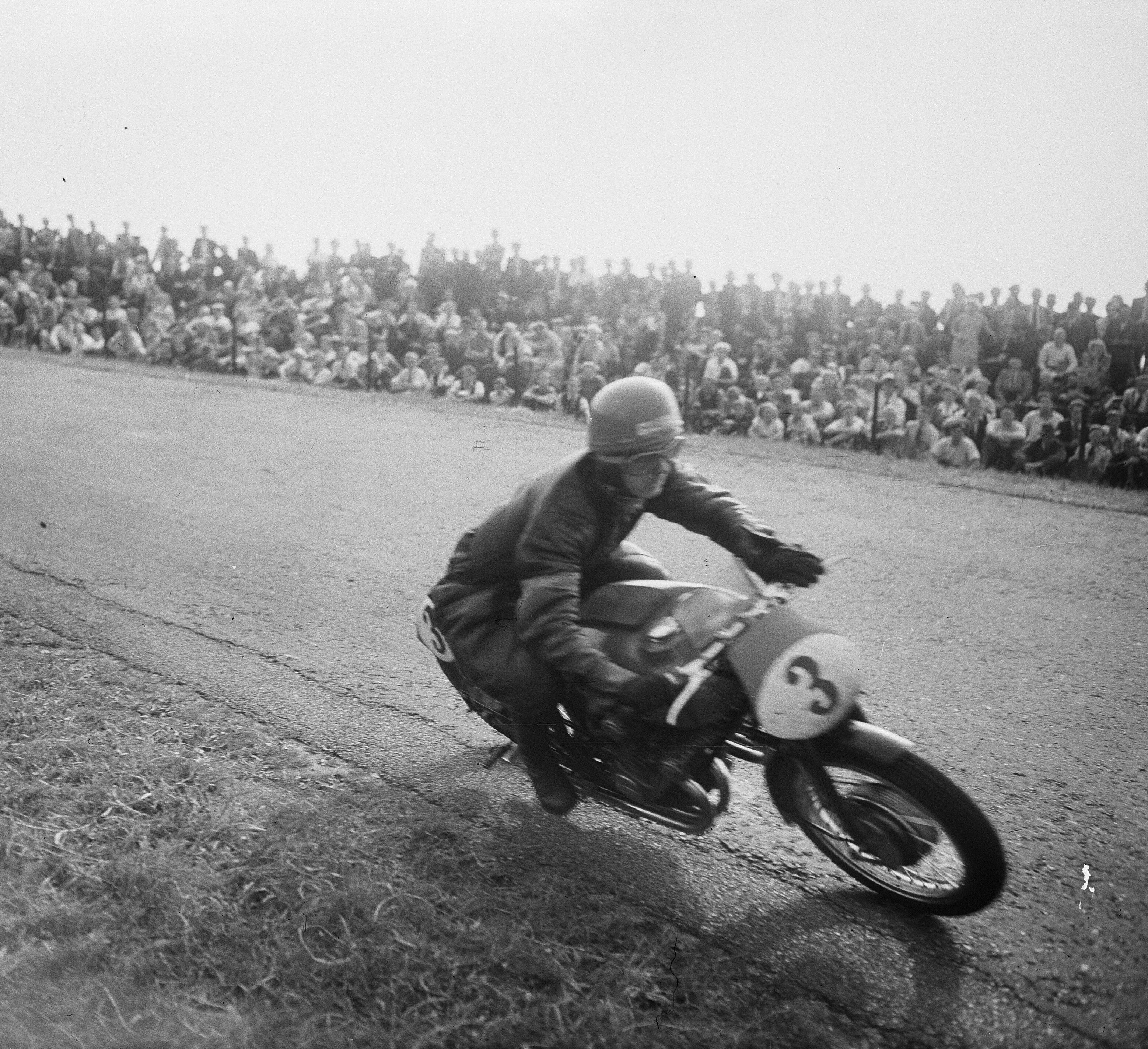 Collectie / Archief : Fotocollectie Anefo Reportage / Serie : [ onbekend ] Beschrijving : T.T. races Assen. Umberto Masetti (winnaar 500 cc) in aktie Datum : 8 juli 1950 Locatie : Assen, Drenthe Trefwoorden : motorsport, sport Persoonsnaam : Masetti, Umberto Fotograaf : Winterbergen, […] / Anefo Auteursrechthebbende : Nationaal Archief Materiaalsoort : Glasnegatief Nummer archiefinventaris : bekijk toegang 2.24.01.09 Bestanddeelnummer : 904-0666